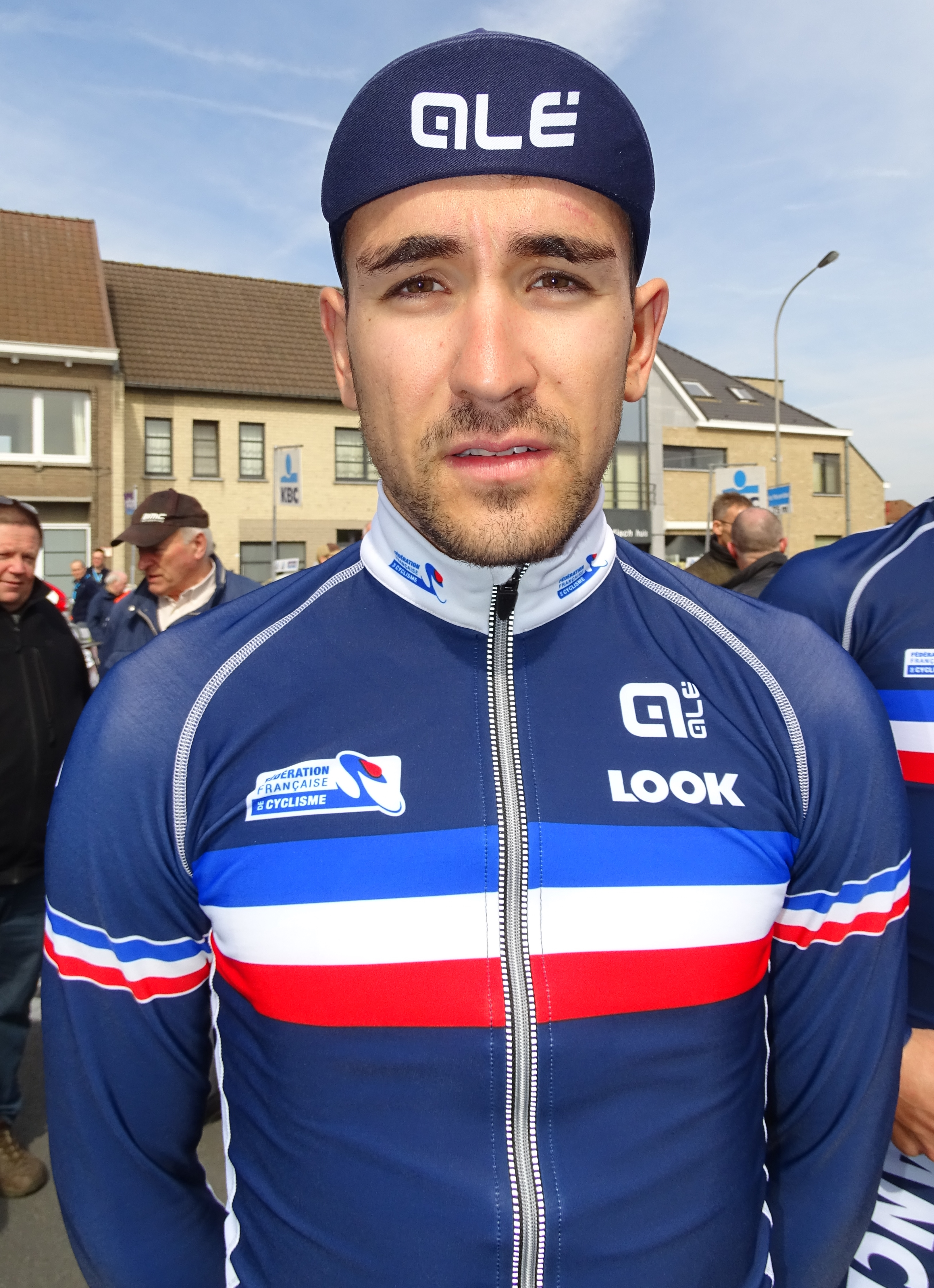 Reportage réalisé le samedi 9 avril à l'occasion du départ et de l'arrivée du Tour des Flandres espoirs 2016 à Audenarde, Belgique.